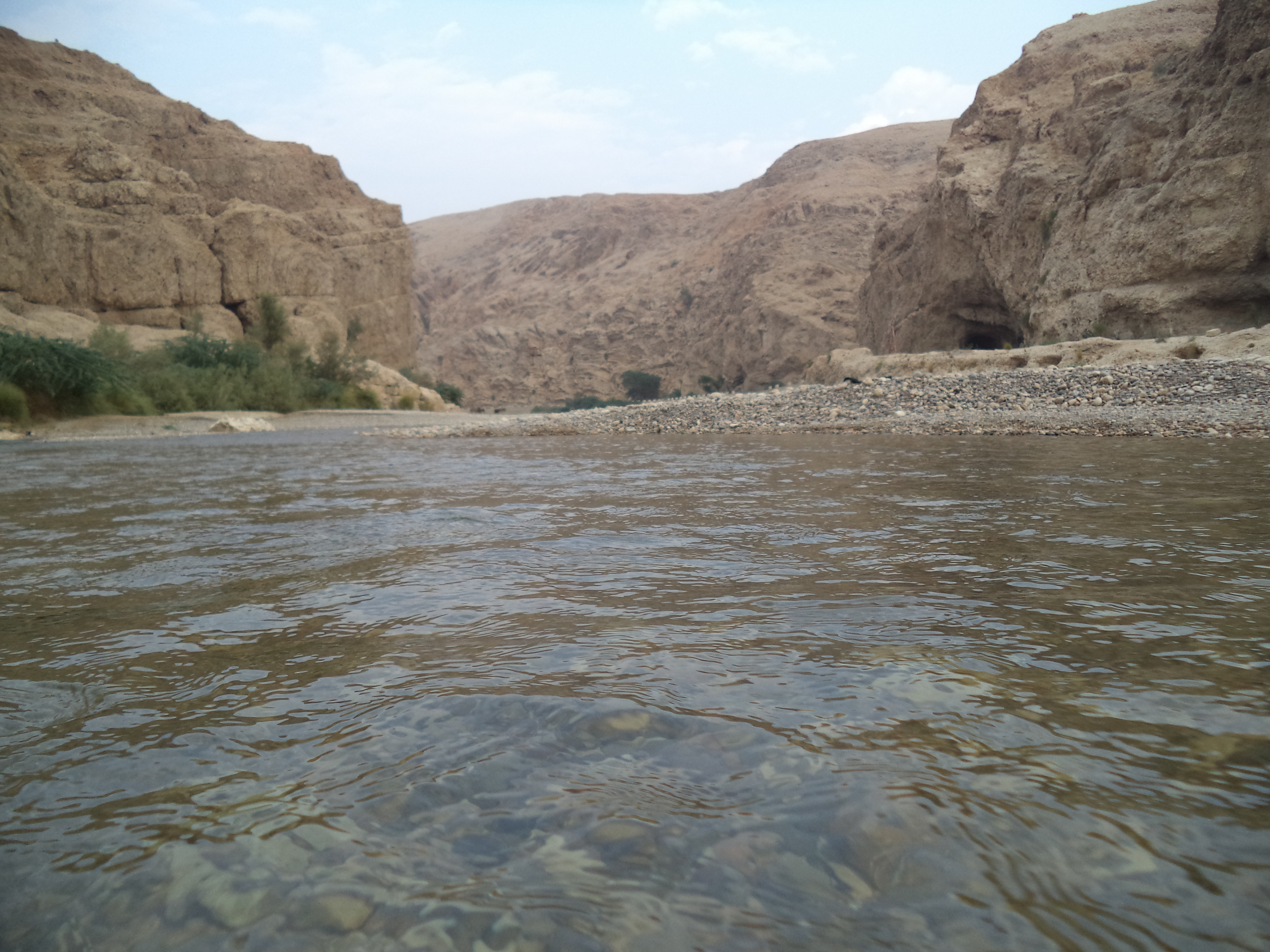 Bolan